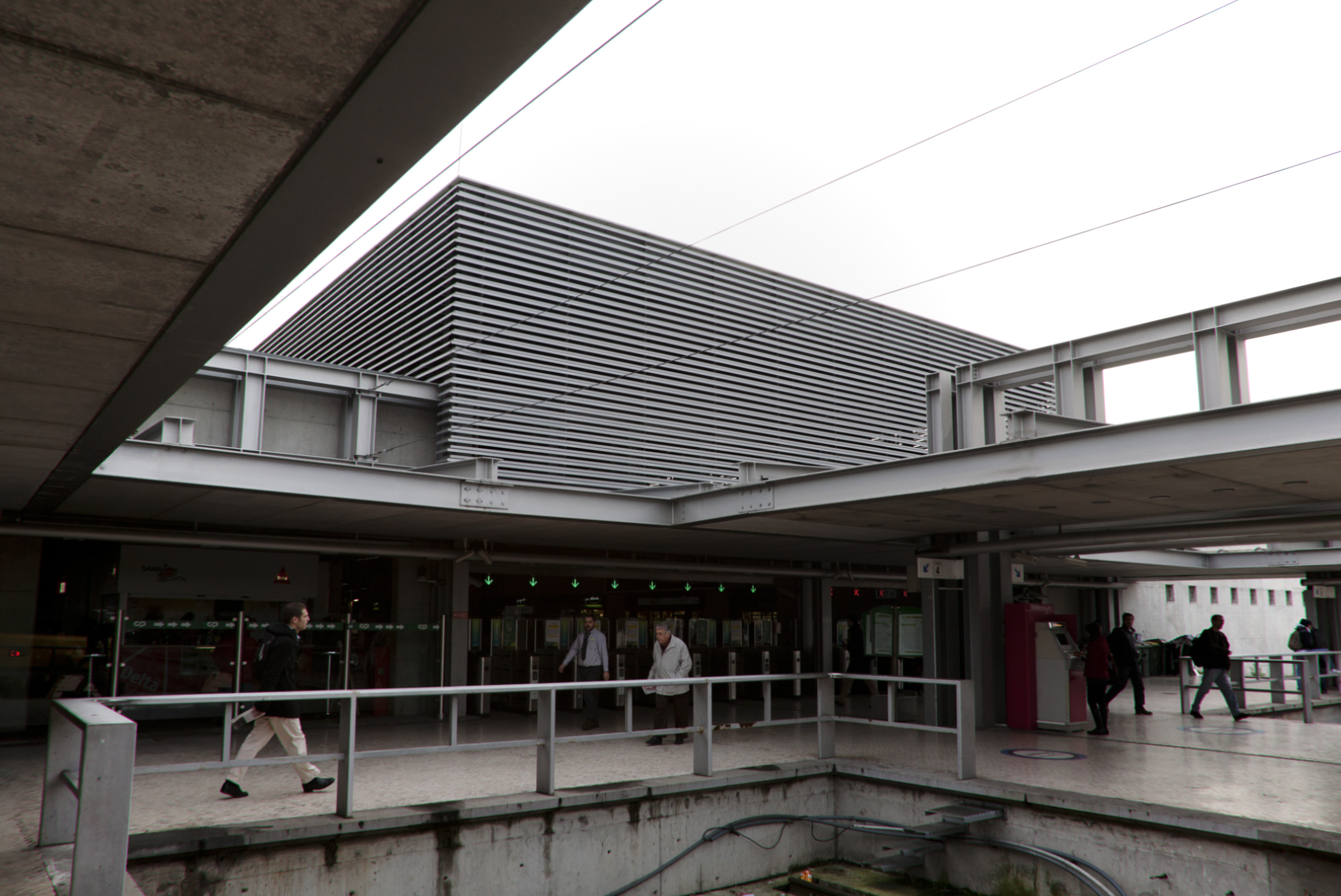 Terminal ferroviario Cais do Sodre; Arq. Pedro Botelho / Nuno T. Pereira